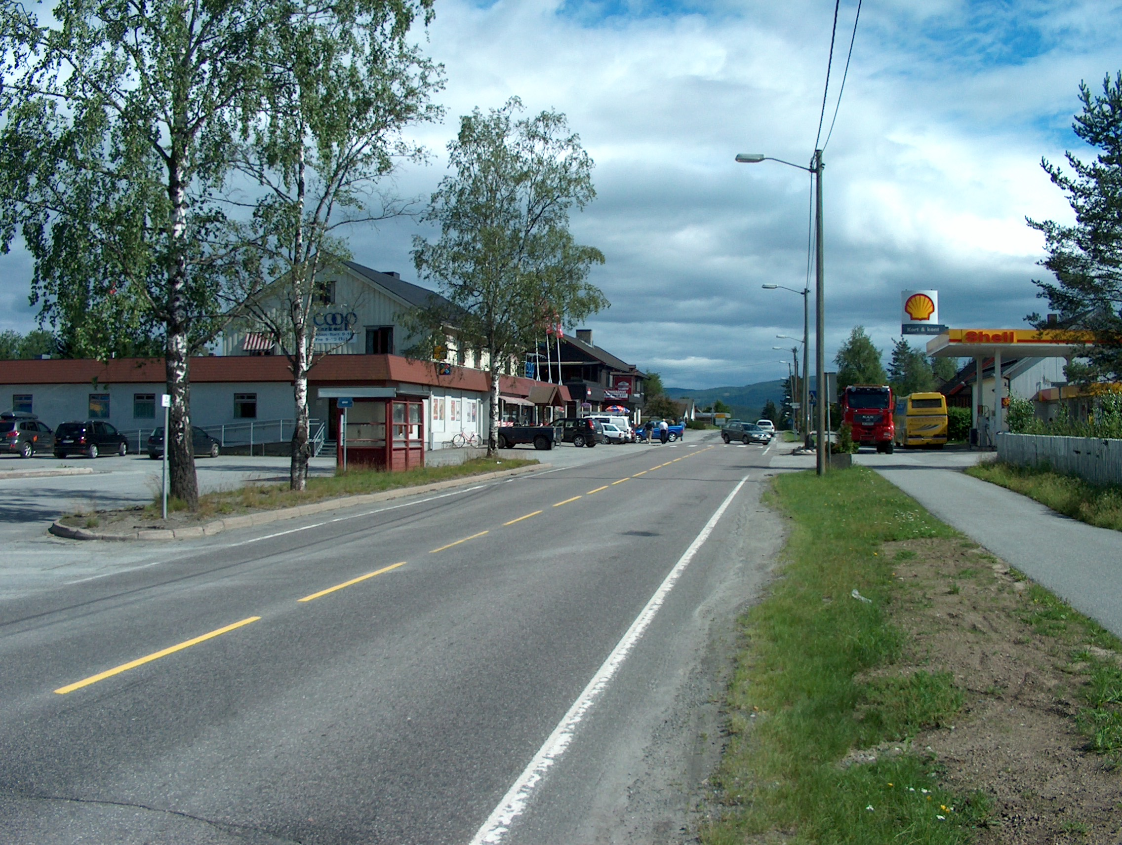 Sokna